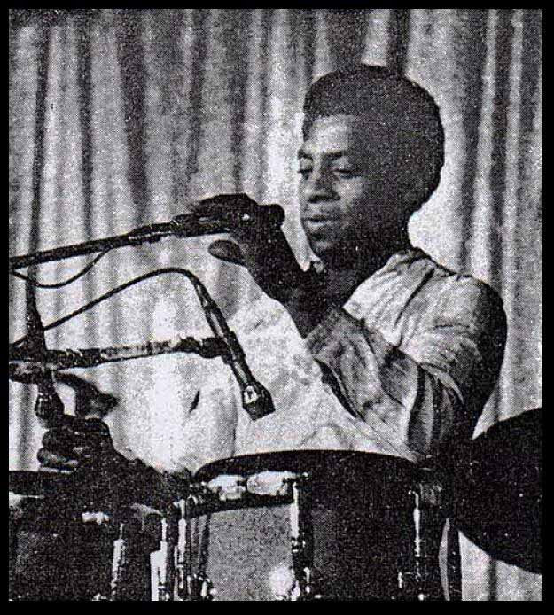 Jimmy Santos , recital de Raices, Buenos Aires